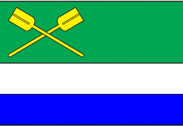 Prapor obce Bystřička, okres Vsetín. List tvoří tři vodorovné pruhy, zelený, bílý a modrý, v poměru 2:1:1. V žerďové polovině zeleného pruhu zkřížené žluté lopaty – karbovačky.